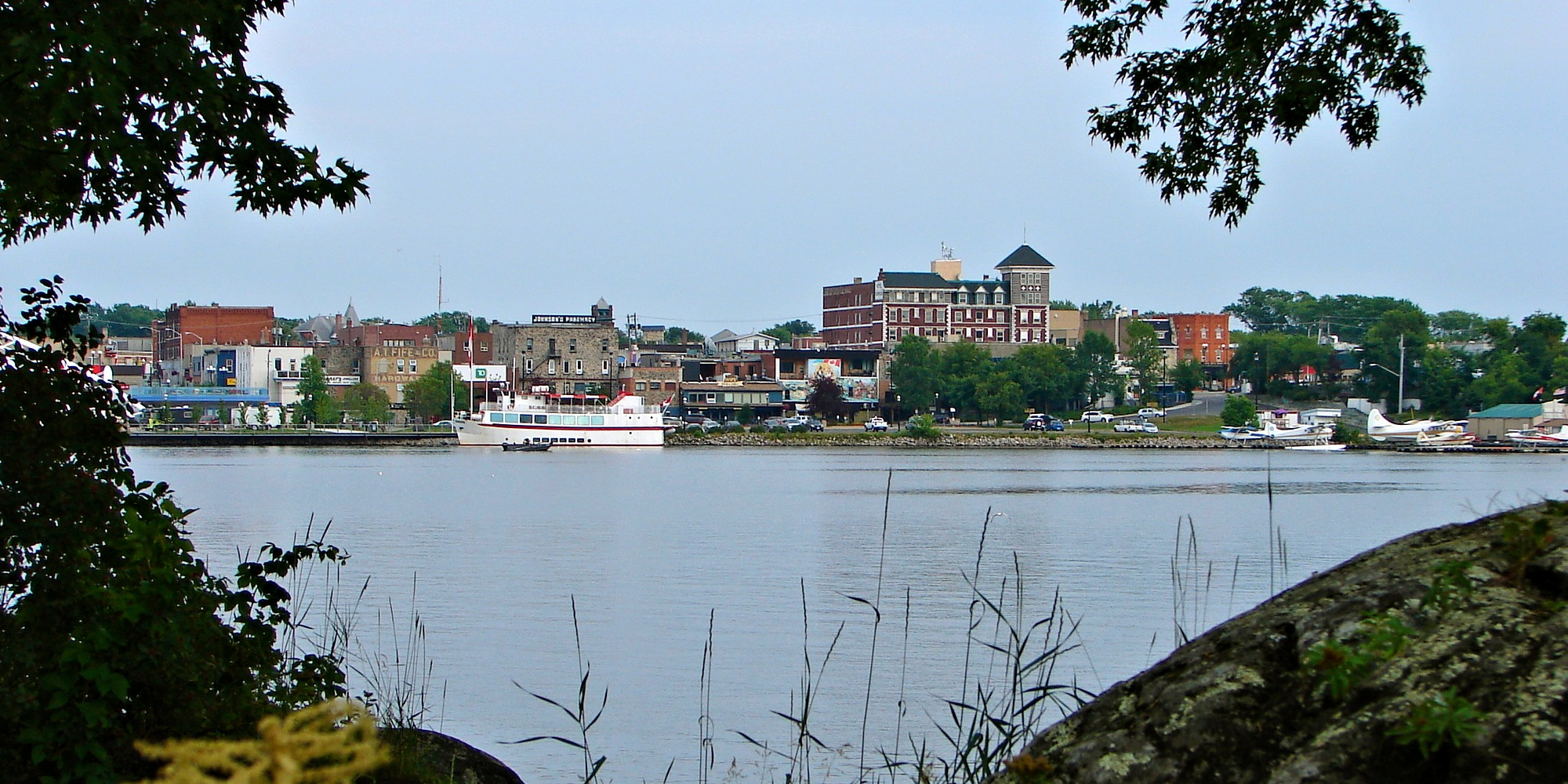 Kenora, Ontario, Canada